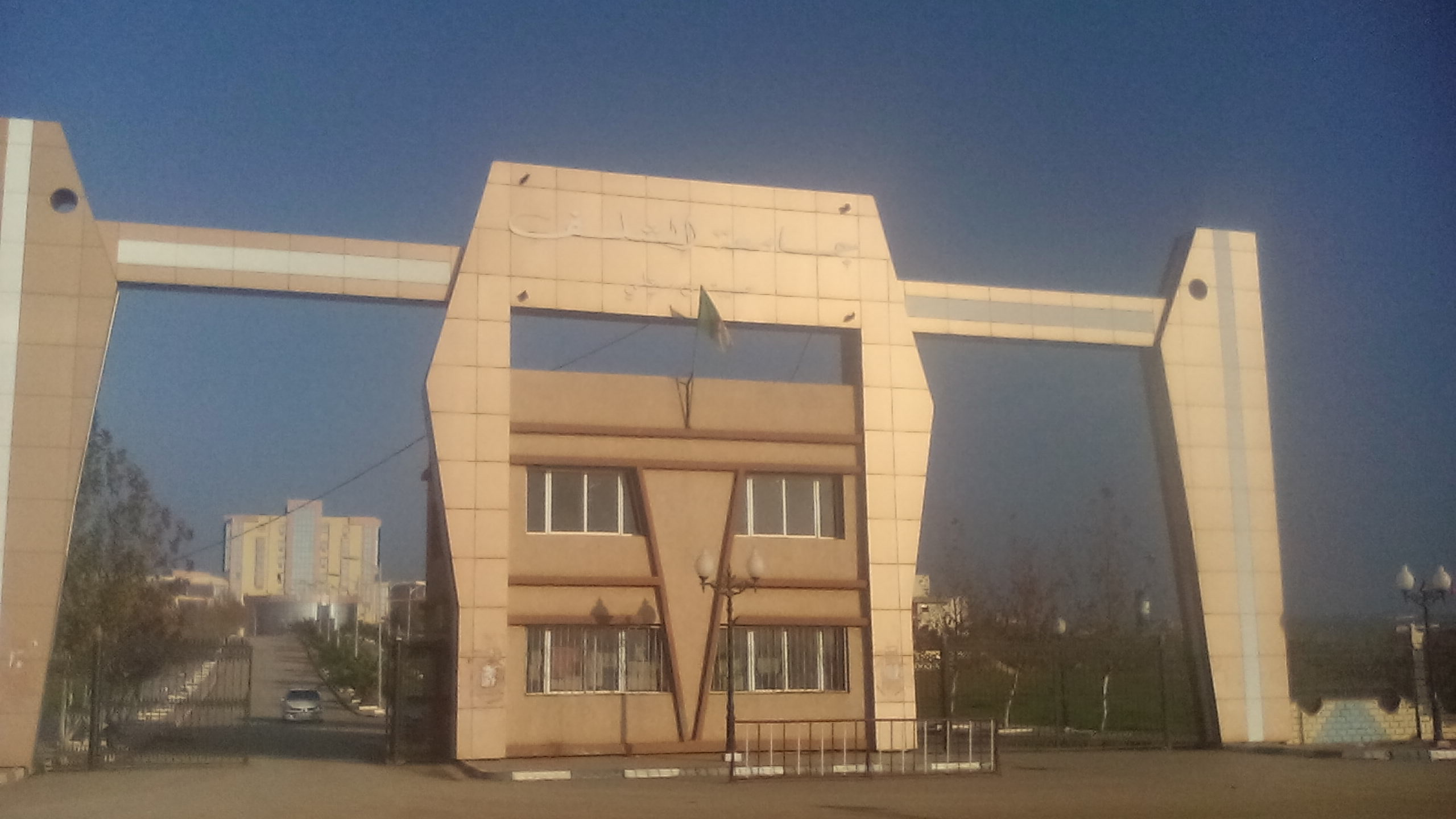 Uhbc pôle ouled fares